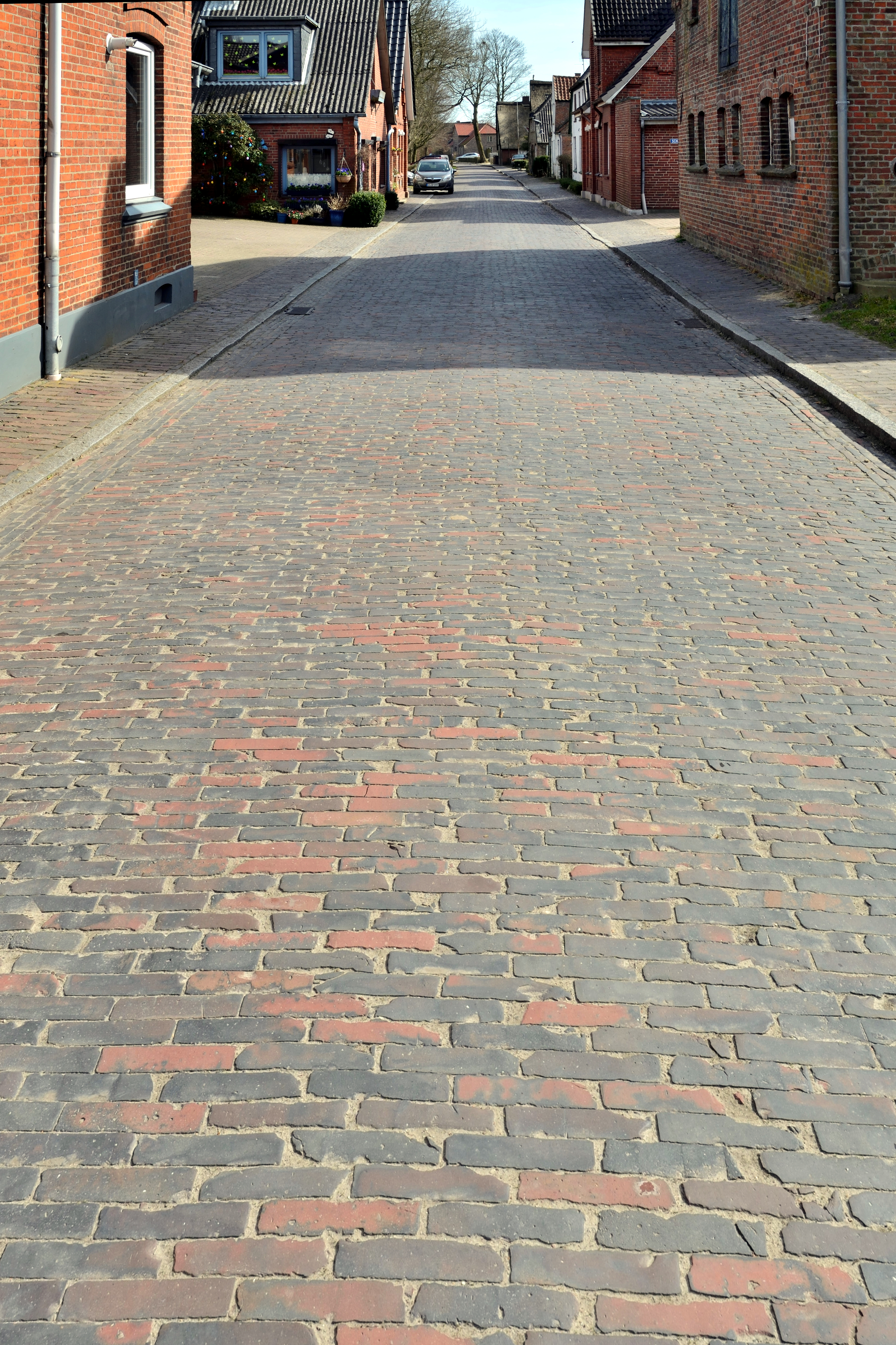 Die Klinkerstrasse in Borsfleth ist ein Kulturdenkmal.